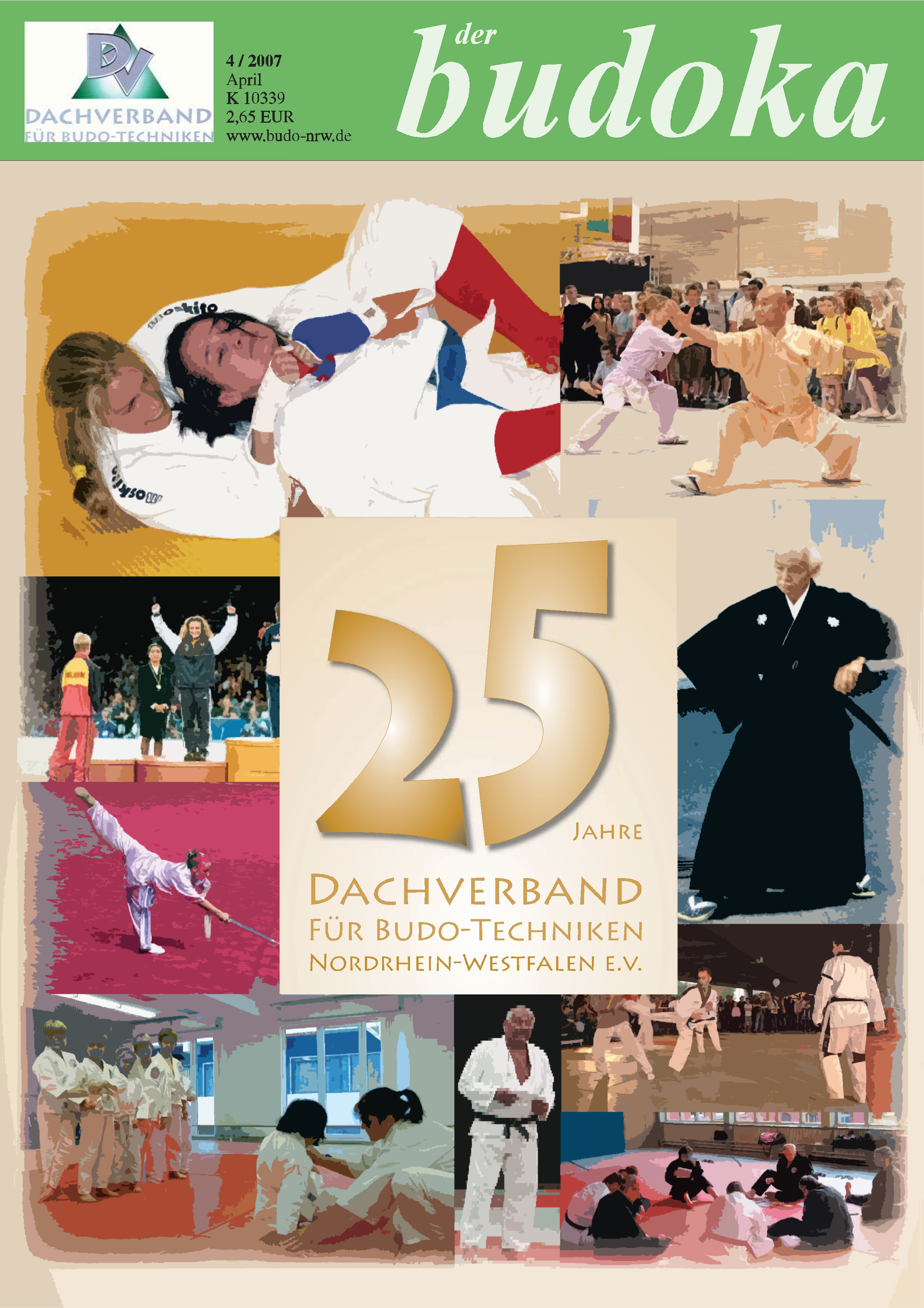 „der budoka“ - Logo und Titelblatt (editiert) der Sportzeitschrift bzw. Fachzeitschrift des Dachverbandes für Budotechniken Nordrhein-Westfalen